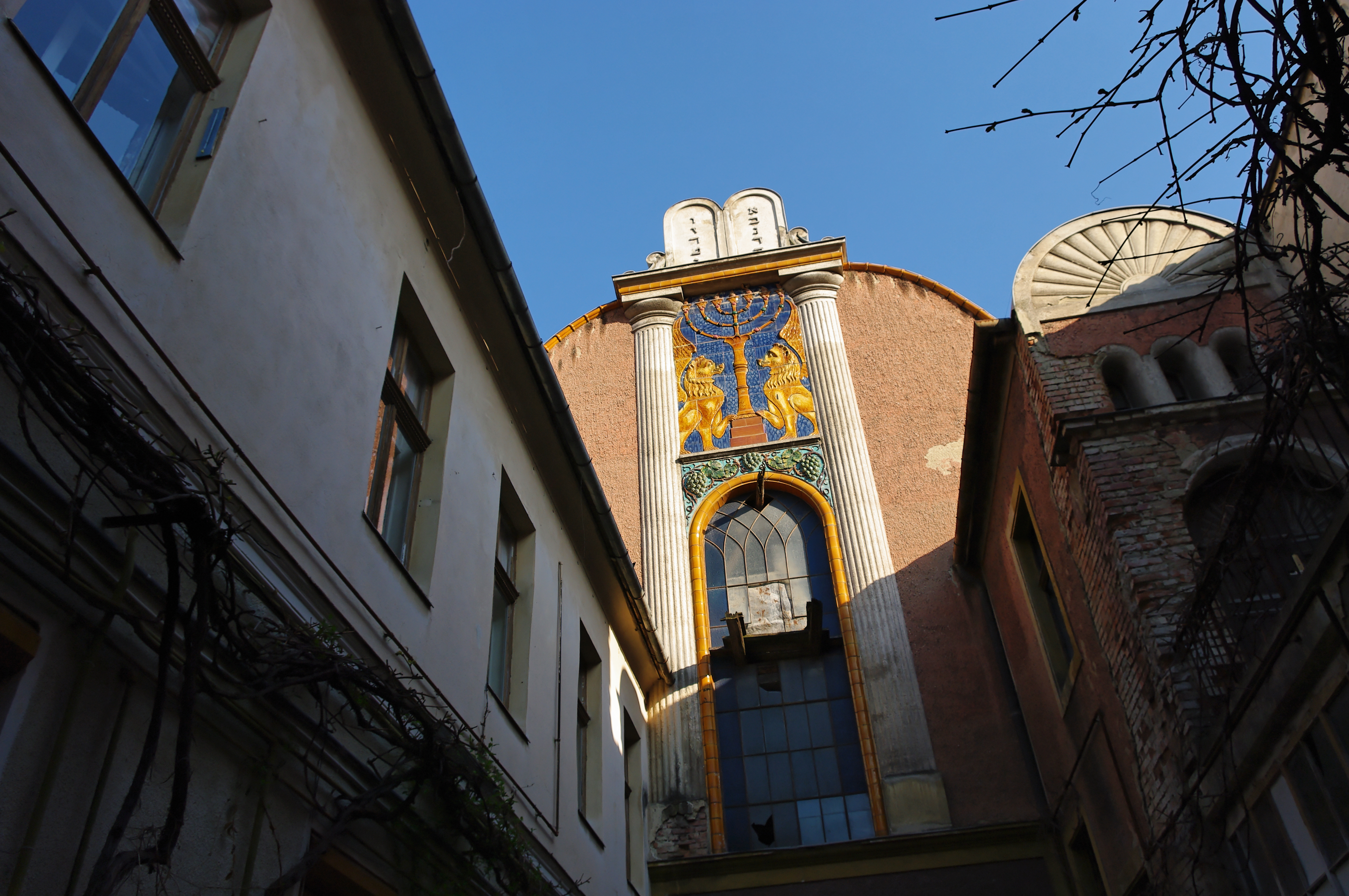 Orthodox synagogue in Brașov (Kronstadt, Brassó)